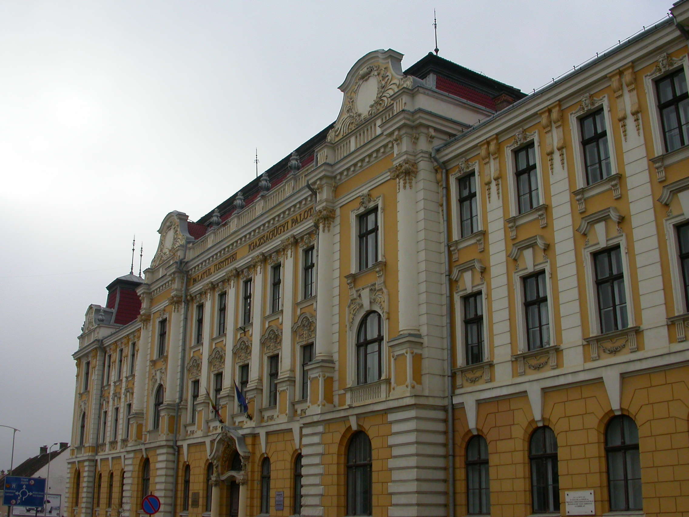 Tribunalul județean, 1904